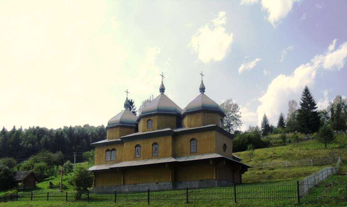 Церква Св. арх. Михаїла (дер.), с.Хитар